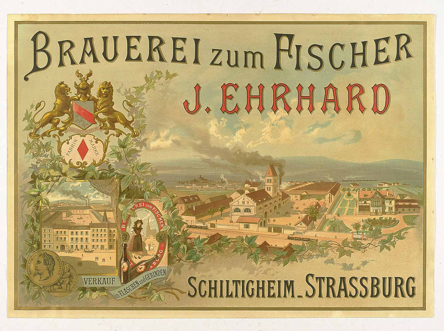 "Brauerei zum Fischer J. Ehrhard". Schiltigheim bei Straßburg, Farblithographie mit Golddruck um 1900. 42,5 x 59,5 cm